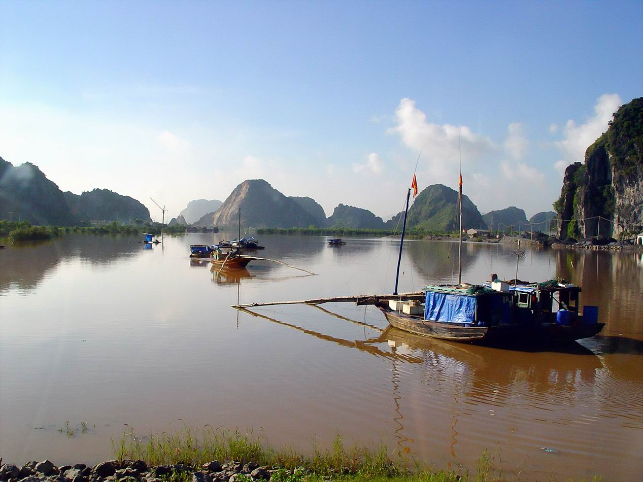 Khu cầu Đá Bạc Thủy Nguyên